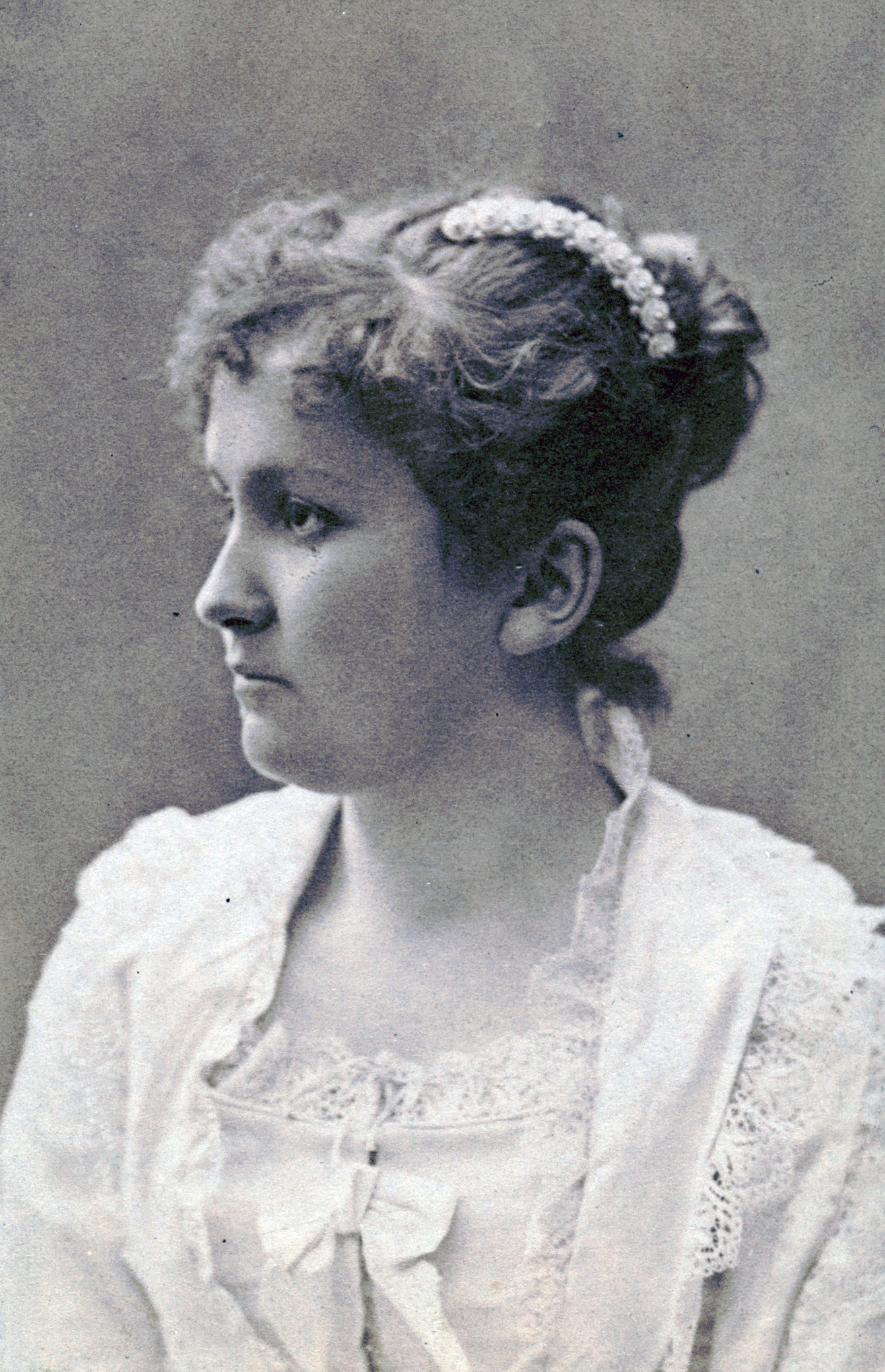 Lotten Arnoldson, skådespelare vid Nya teatern 1881